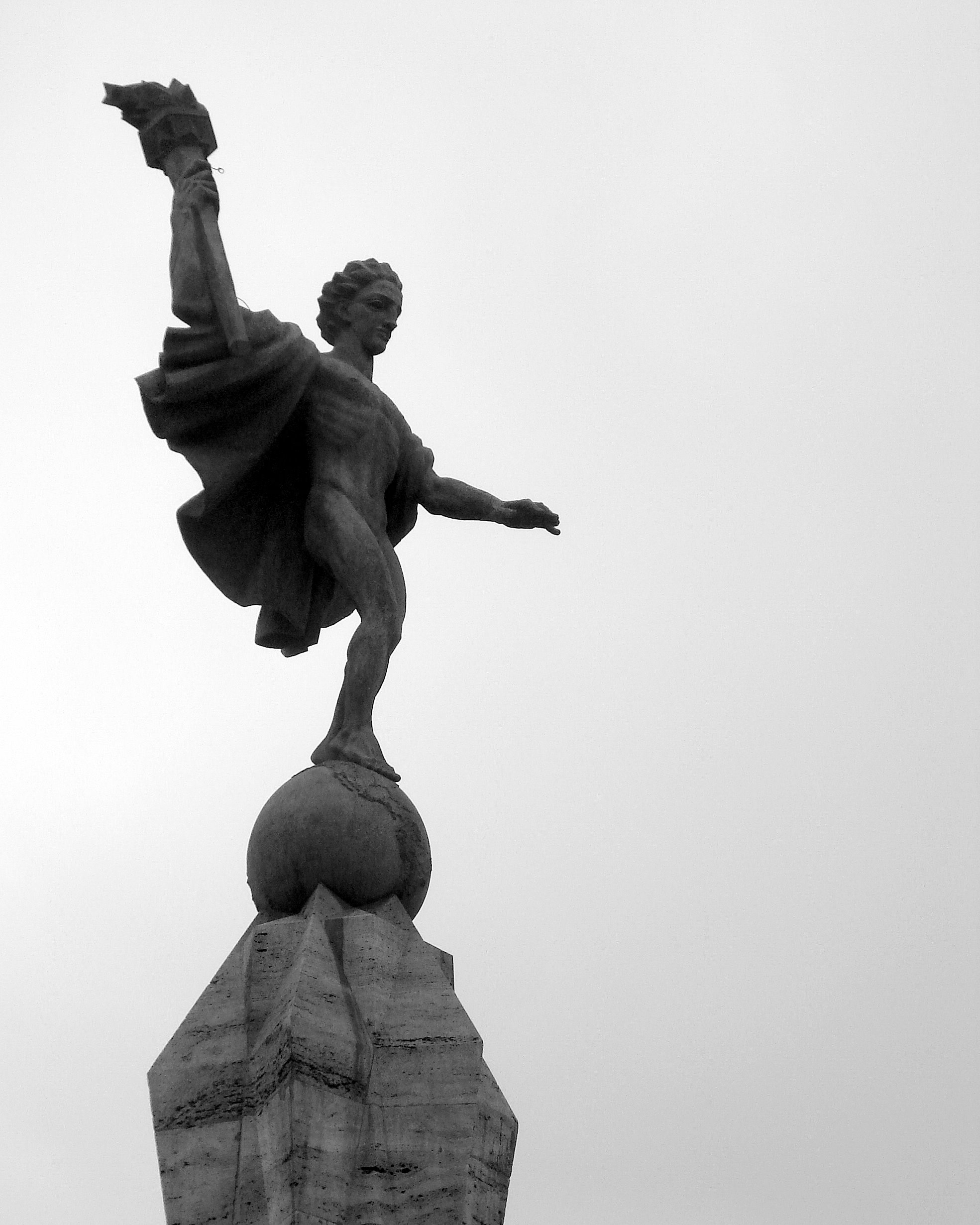 Imagen superior del monumento, construido por el escultor alemán Edmundo Moeller. Inaugurado el 4 de Julio de 1929. Plaza de Armas. Trujillo, Perú. Upper part of the monument, built by Edmundo Moeller, german sculptor. Unveiled on July 4th, 1929. Main Square. Trujillo, Peru.